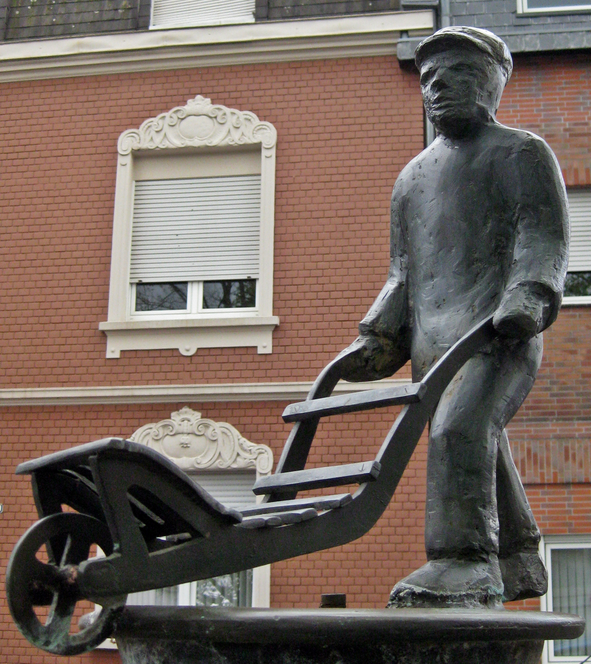 Deutschland, Bonn, Beuel-Ramersdorf, Dorfplatz (Ecke Gallustraße/Holzgasse): Schürreskarrenbrunnen (Künstlerin: Sigrid Wenzel).